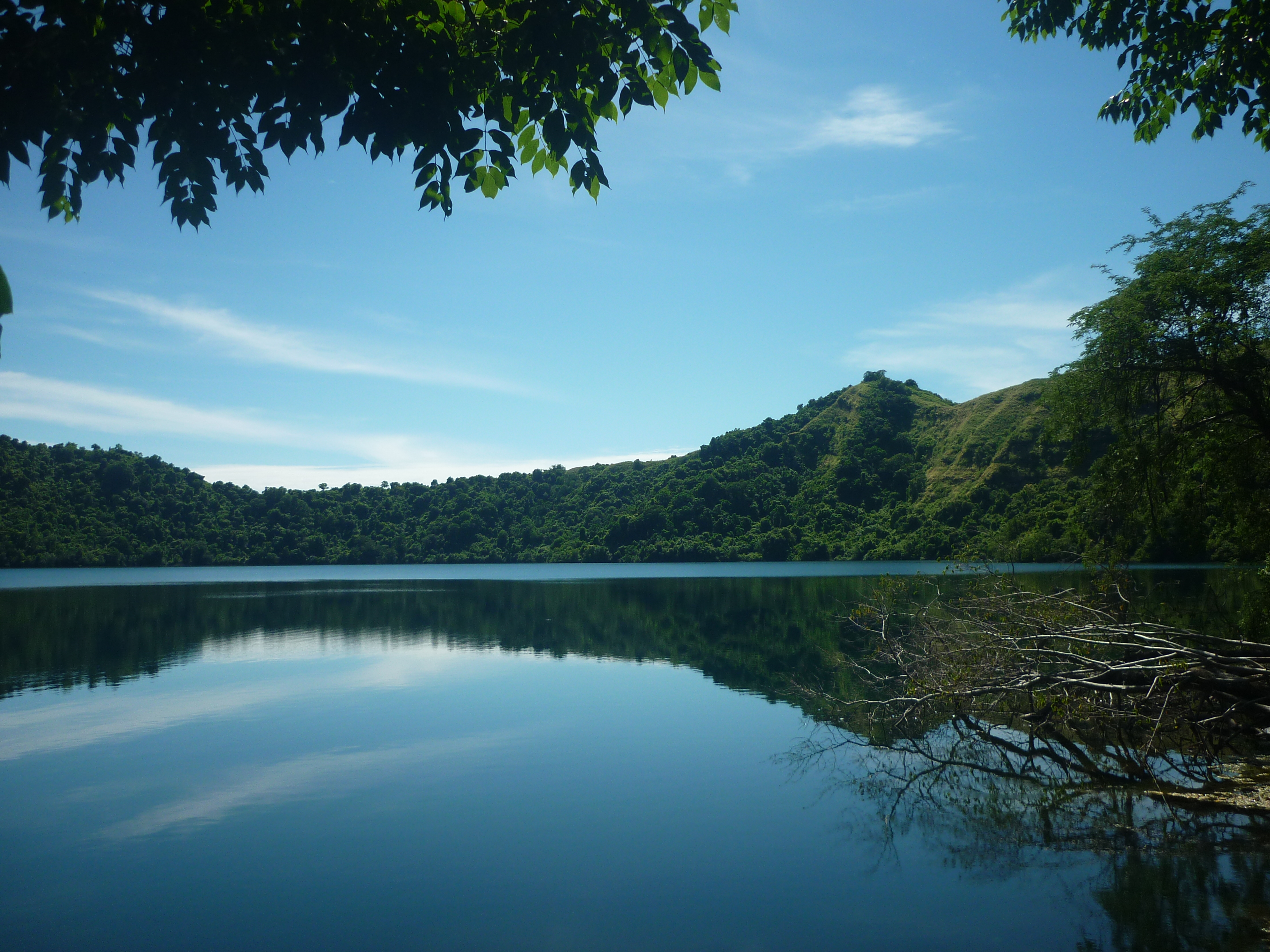 Pemandangan Danau Satonda, Sumbawa Indonesia